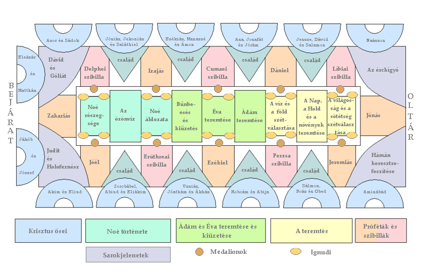 A Sixtus-kápolna freskórészleteinek elhelyezkedése